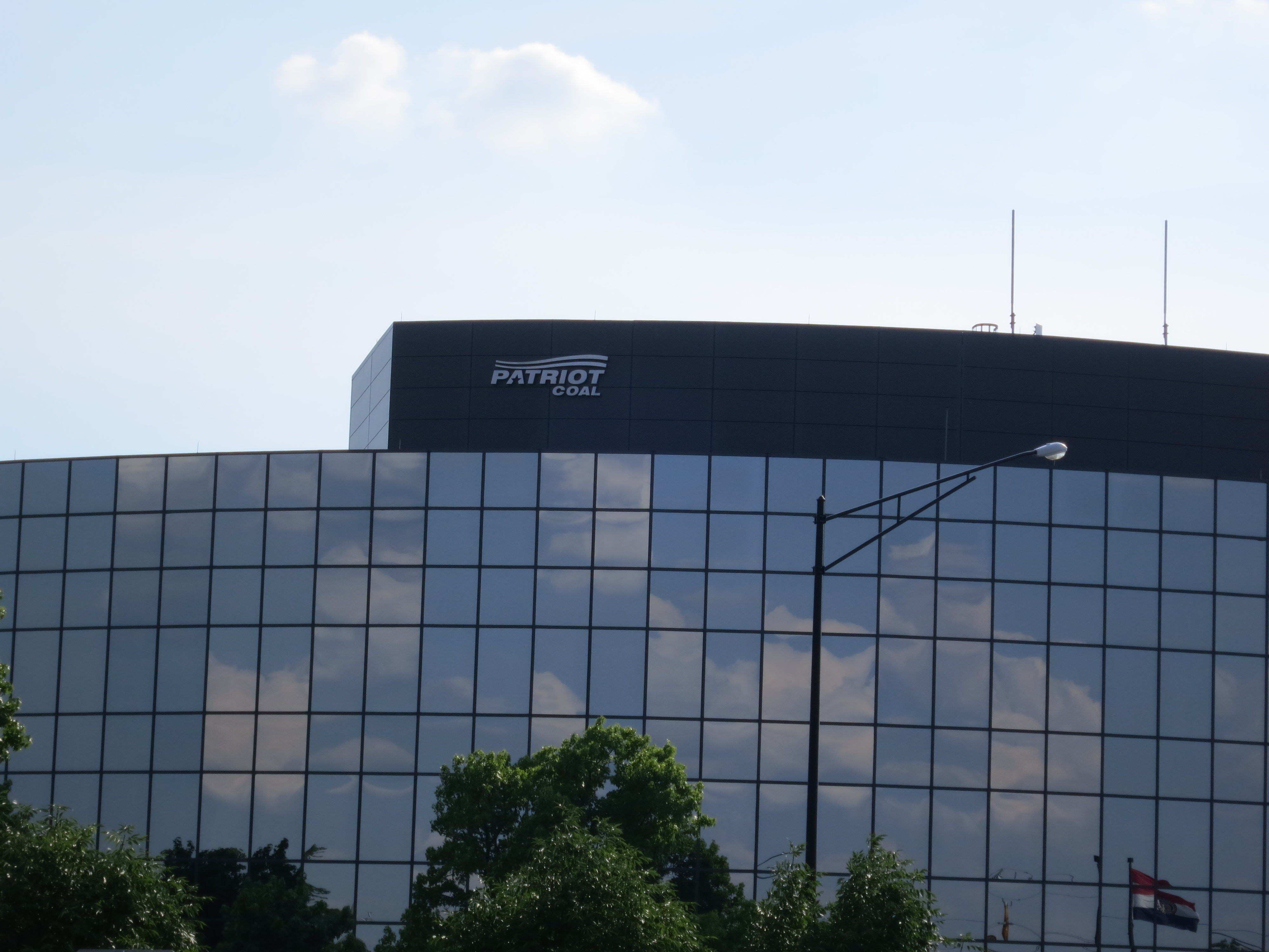 Patriot Coal